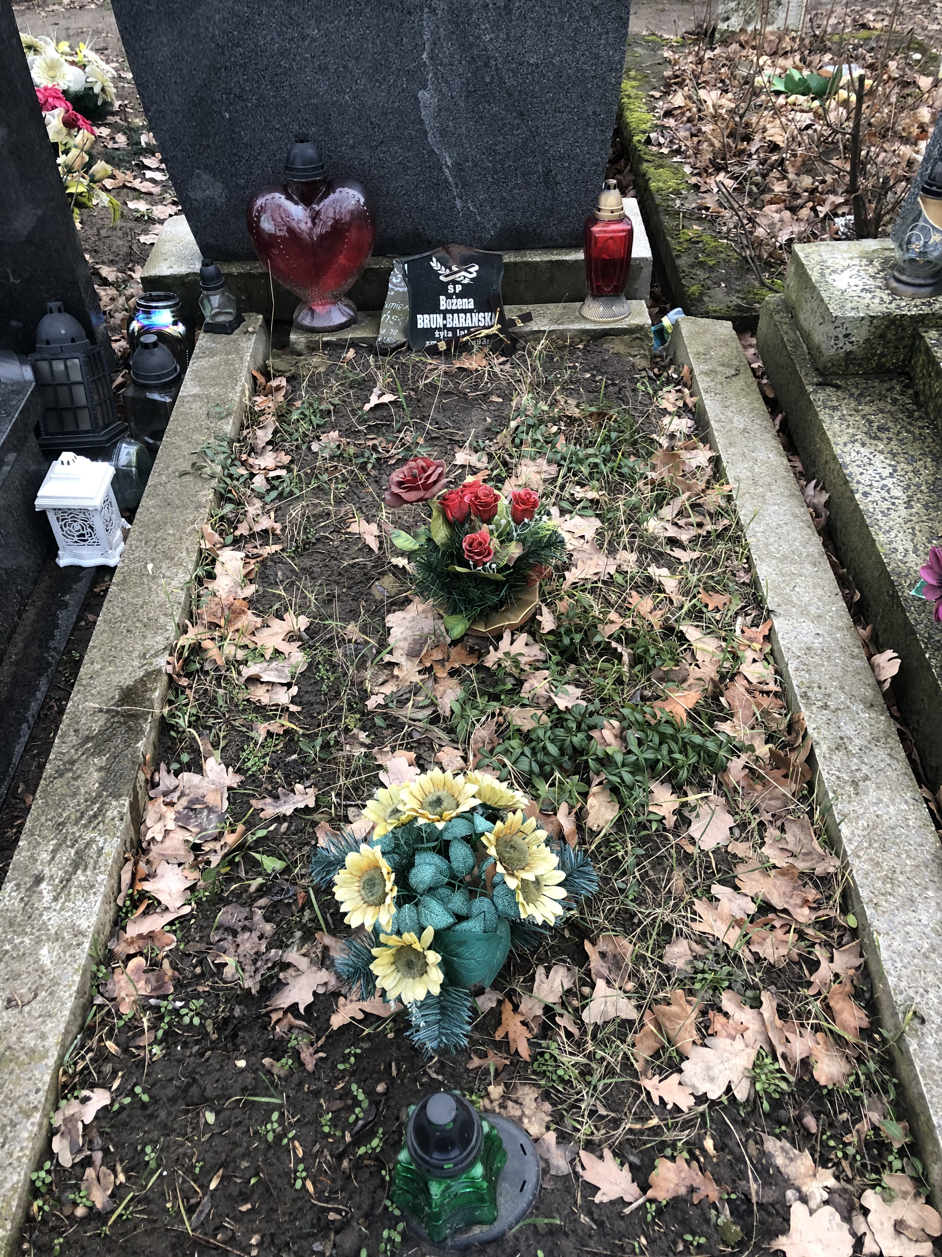 Grób Bożeny Brun-Barańskiej na Cmentarzu Bródnowskim